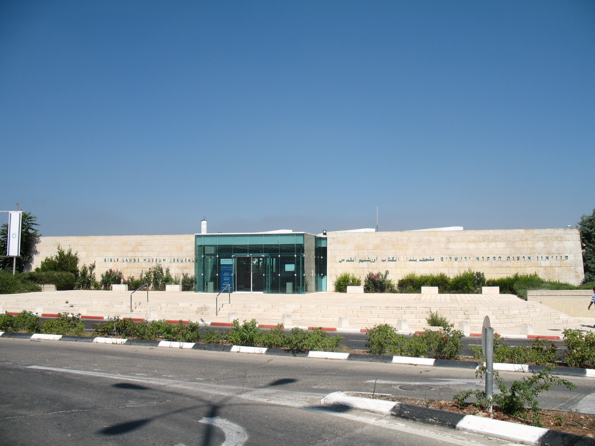 Biblical Lands Museum Jerusalem